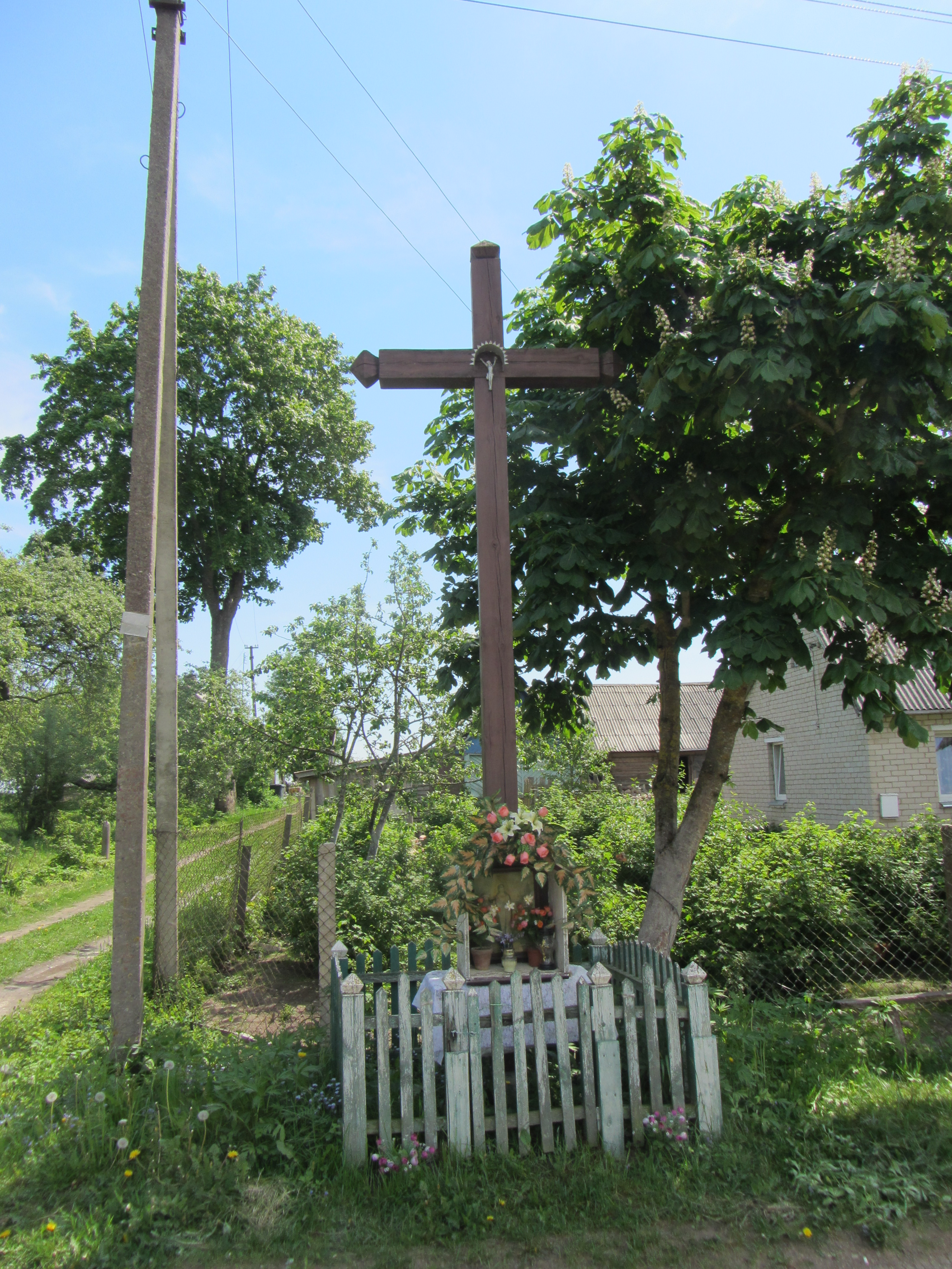 Andriukėnai 18158, Lithuania